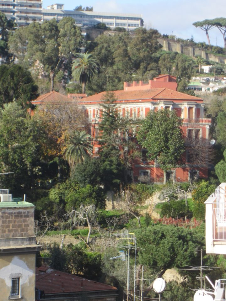 Villa eretta nel Settecento e modificata più volte nel tempo.